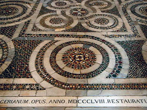 Reggio Calabria - pavimento a mosaico della Chiesa degli Ottimati.